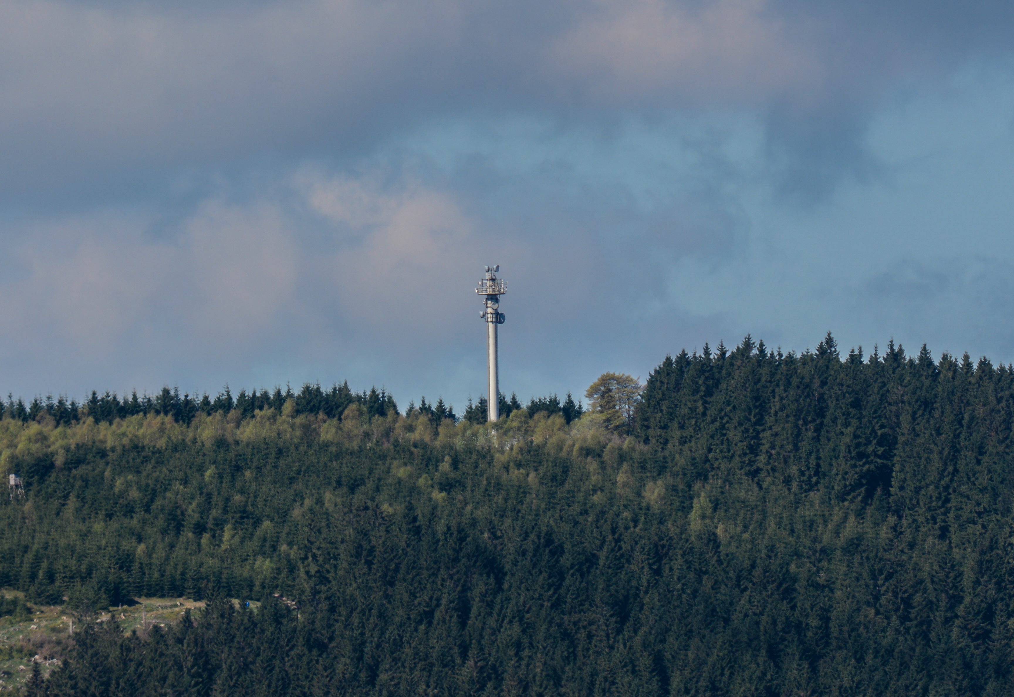 Gipfel des Hohen Wald mit ehmaligem Richtfunkturm der Bundeswehr